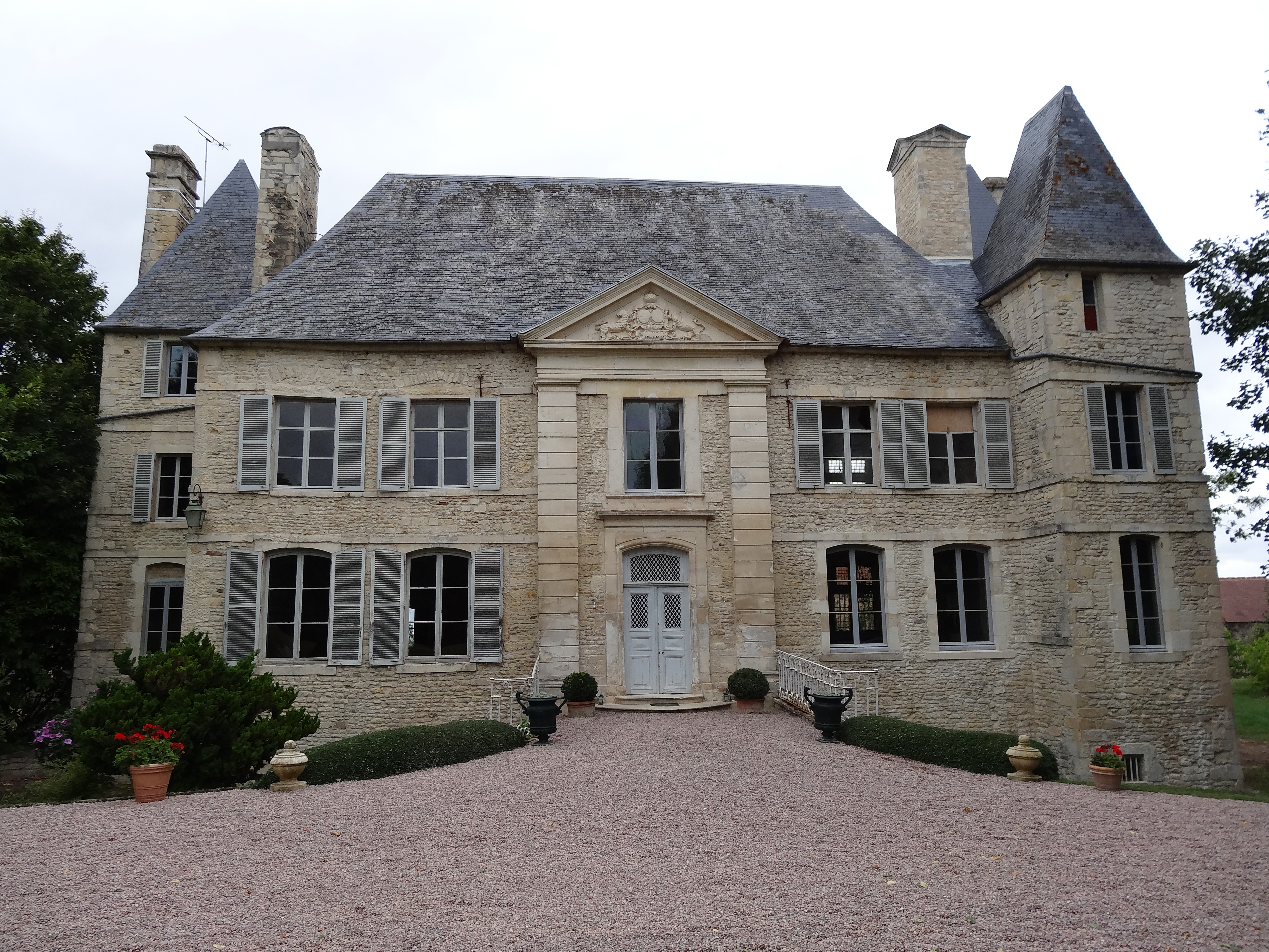 Château d'Olendon (Inscrit) Façade sud-est du château d'Olendon (Calvados, France) modifiée en 1715 .